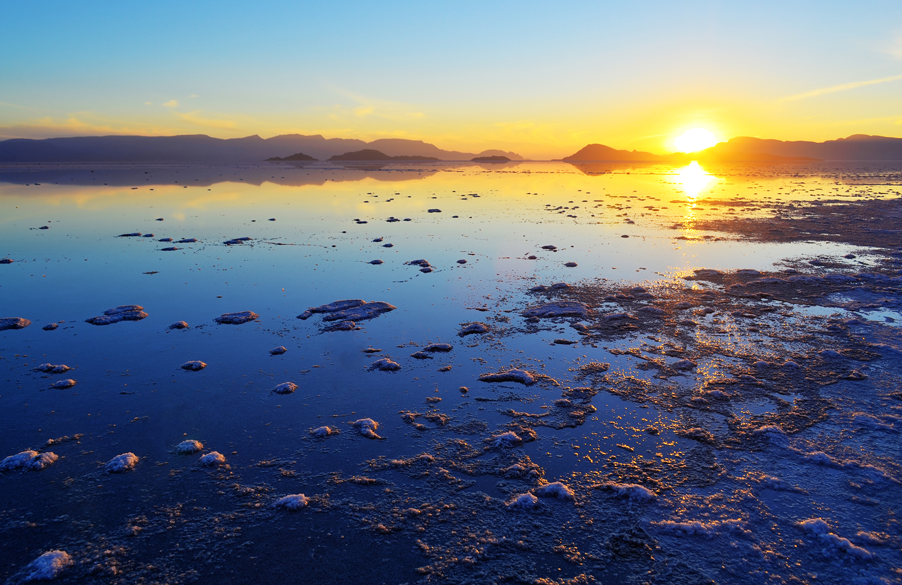 Bakhtegan lake